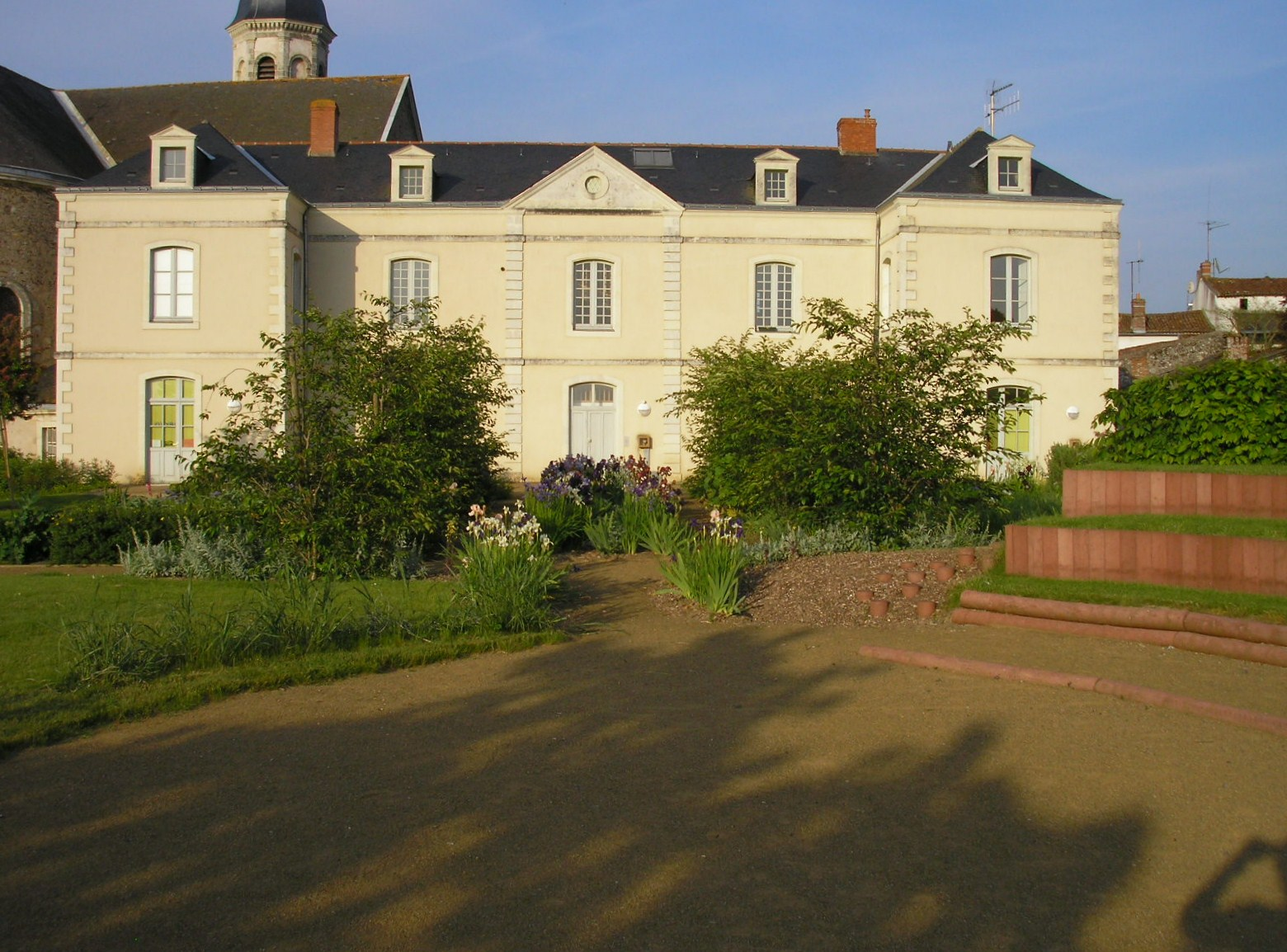 Bibliothèque du Mesnil-en-Vallée (Maine-et-Loire, France) vue du parc.